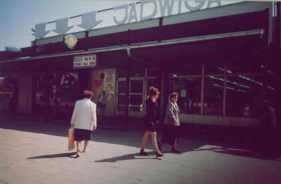 Supersam Jadwiga w Gorzowie Wielkopolskim, ul. Matejki, ok. 2000 r.